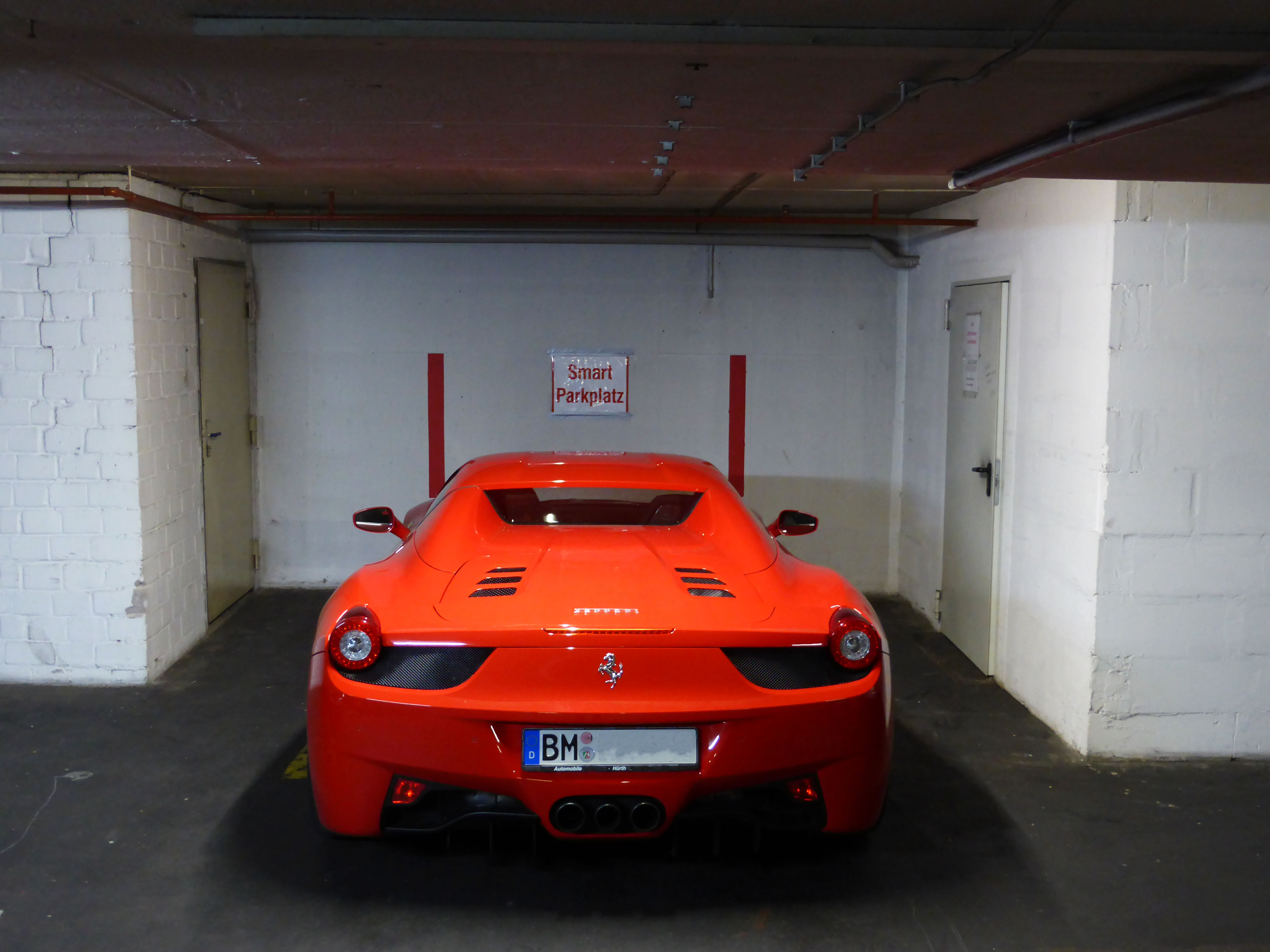 hier stimmt doch was nicht...?